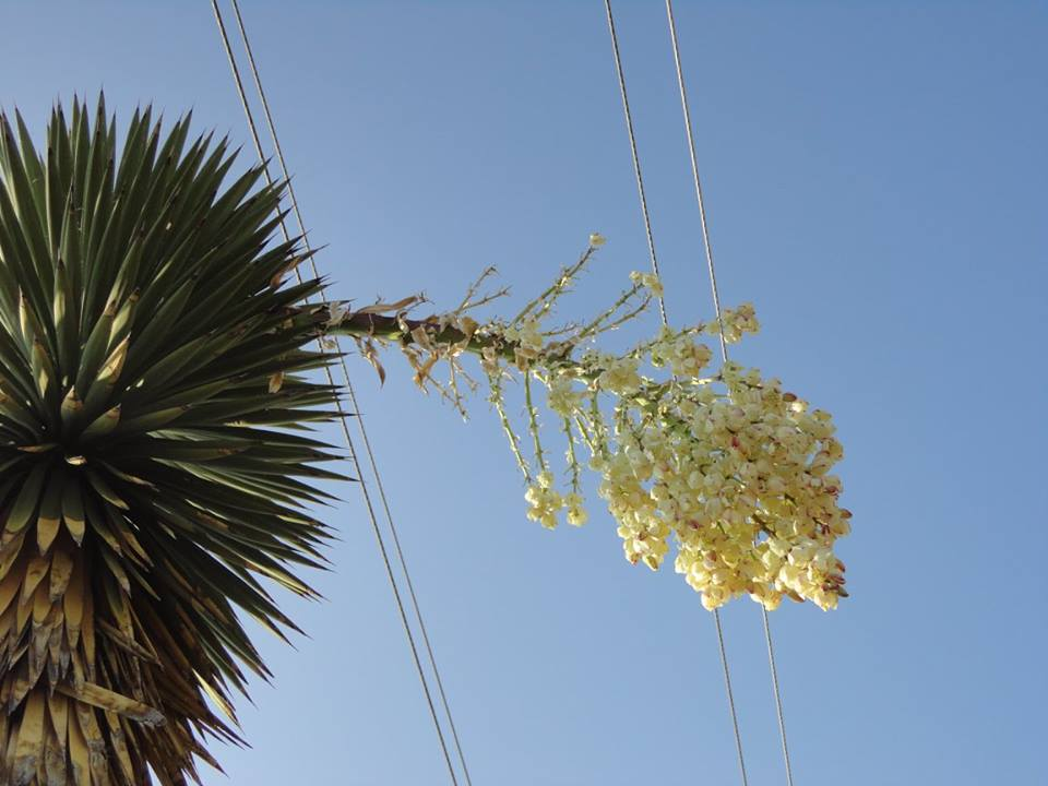 Infloresencia de Yucca filifera.